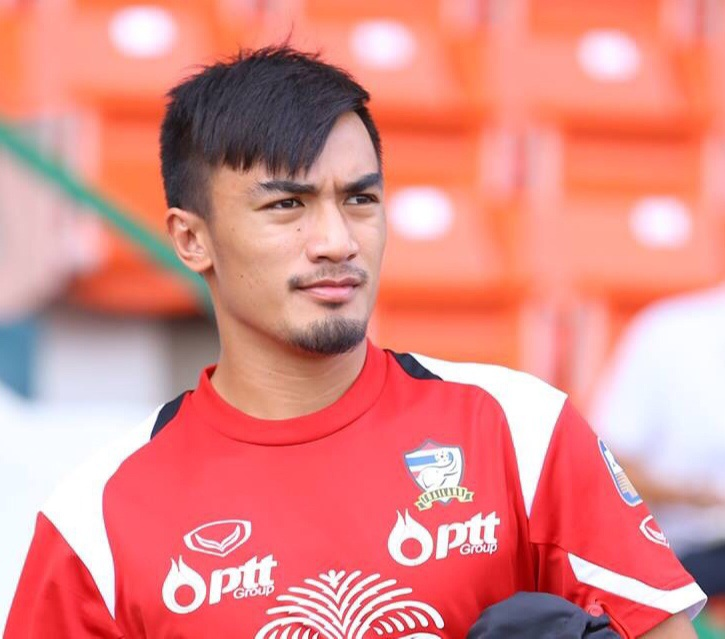 วสันต์ ฮมแสน